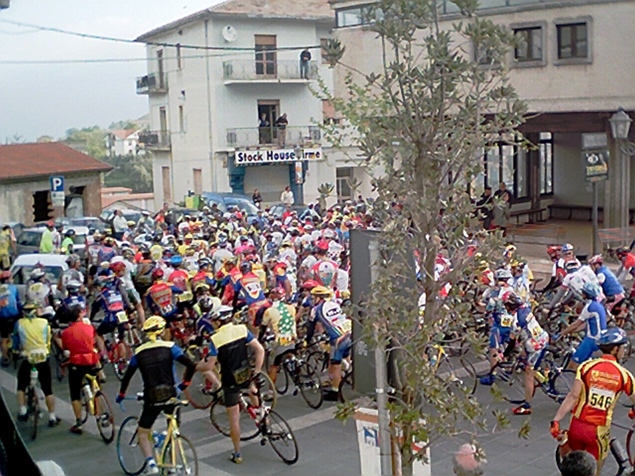 Fotografia scattata dal sottoscritto: Emilio Viola